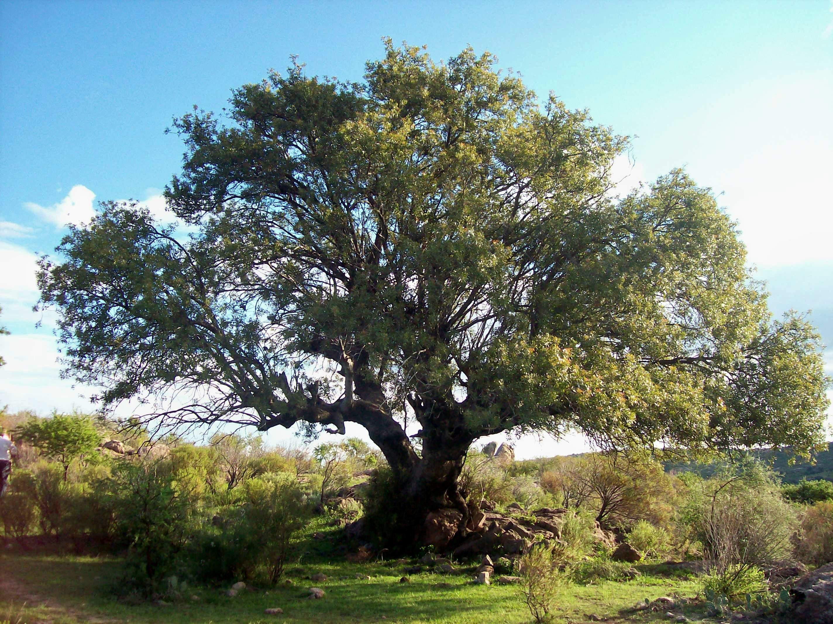 Blepharocalyx gigantea Lillo, conocido en la región como Horco Molle. Esta foto está tomada en la región de Tras la Sierra, cerca de Mina Clavero, provincia de Córdoba, Argentina.